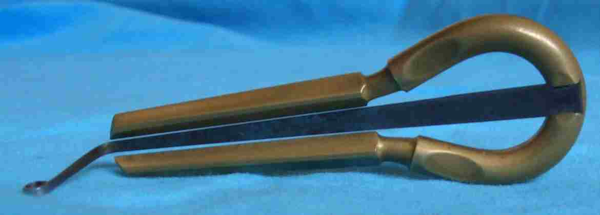 jaw harp